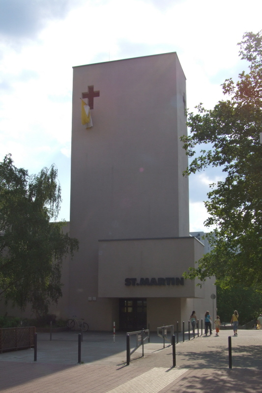 Kath. Kirche St. Martin in Märkisches Viertel in Berlin-Reinickendorf Architekt Werner Düttmann